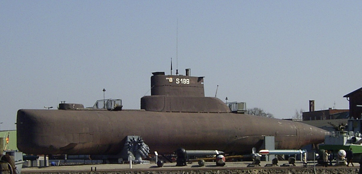 Deutsches U-Boot U10 der Klasse 205, ausgestellt im Deutschen Marinemuseum Wilhelmshaven.